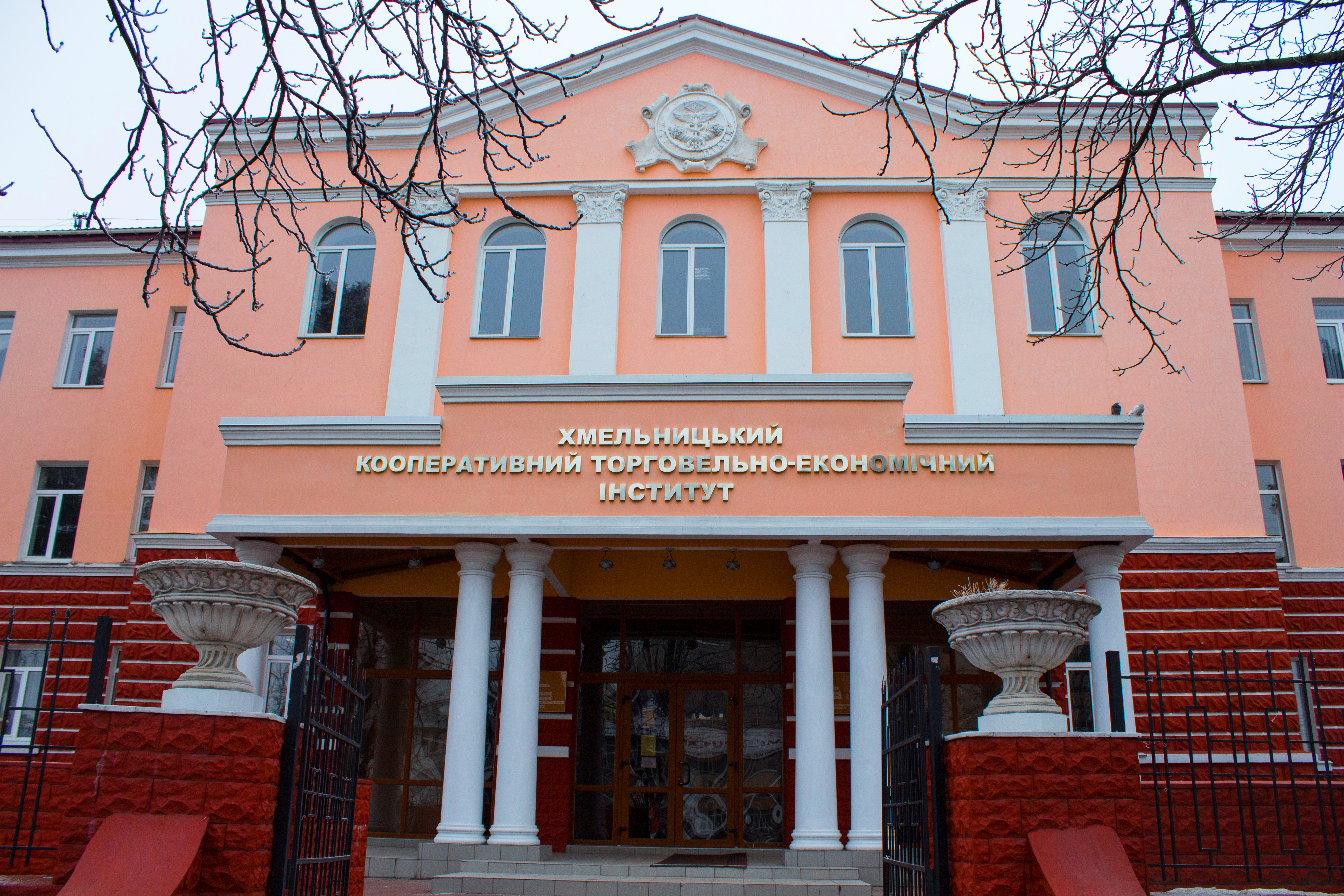 Світлина навчального корпусу Хмельницького кооперативного торговельно-економічного інституту